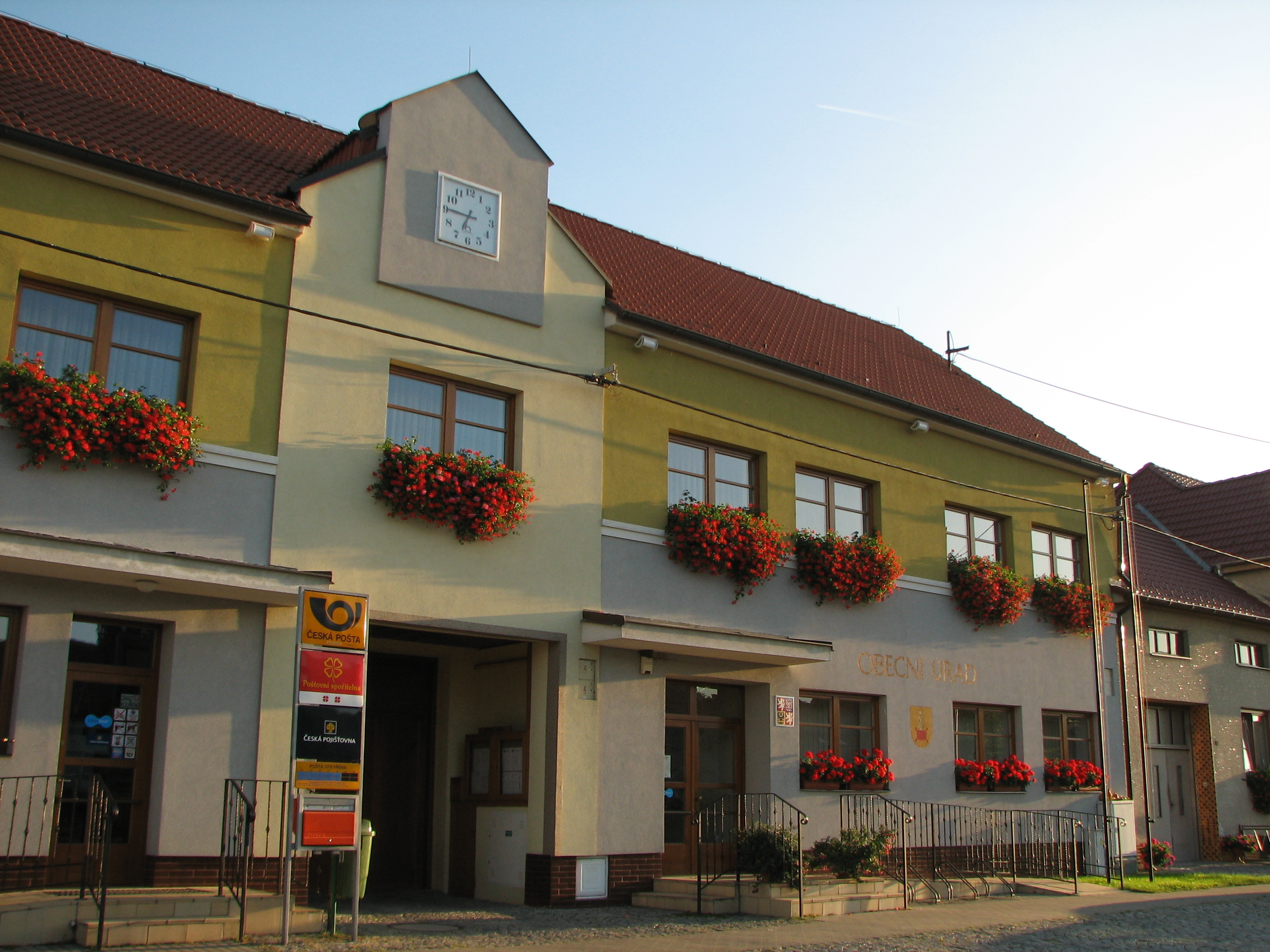 Česky: Hovorany - obecní úřad